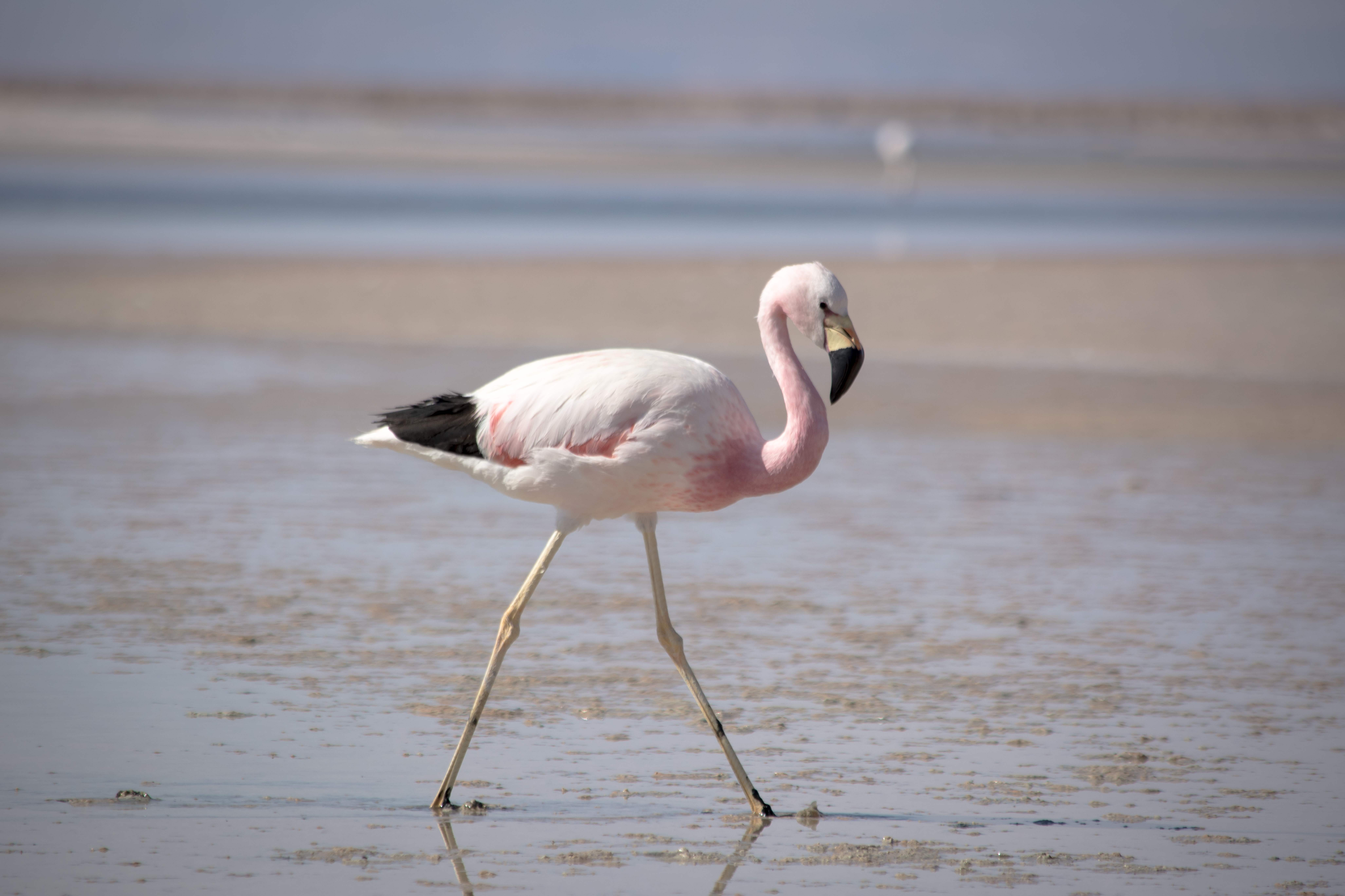 Reserva nacional Los Flamencos